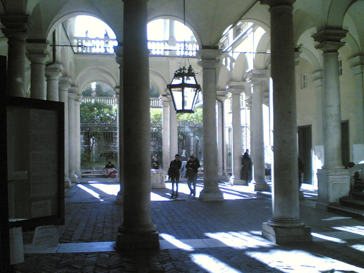 Università di Genova (facoltà di Lettere) - foto realizzata da Utente Microsoikos